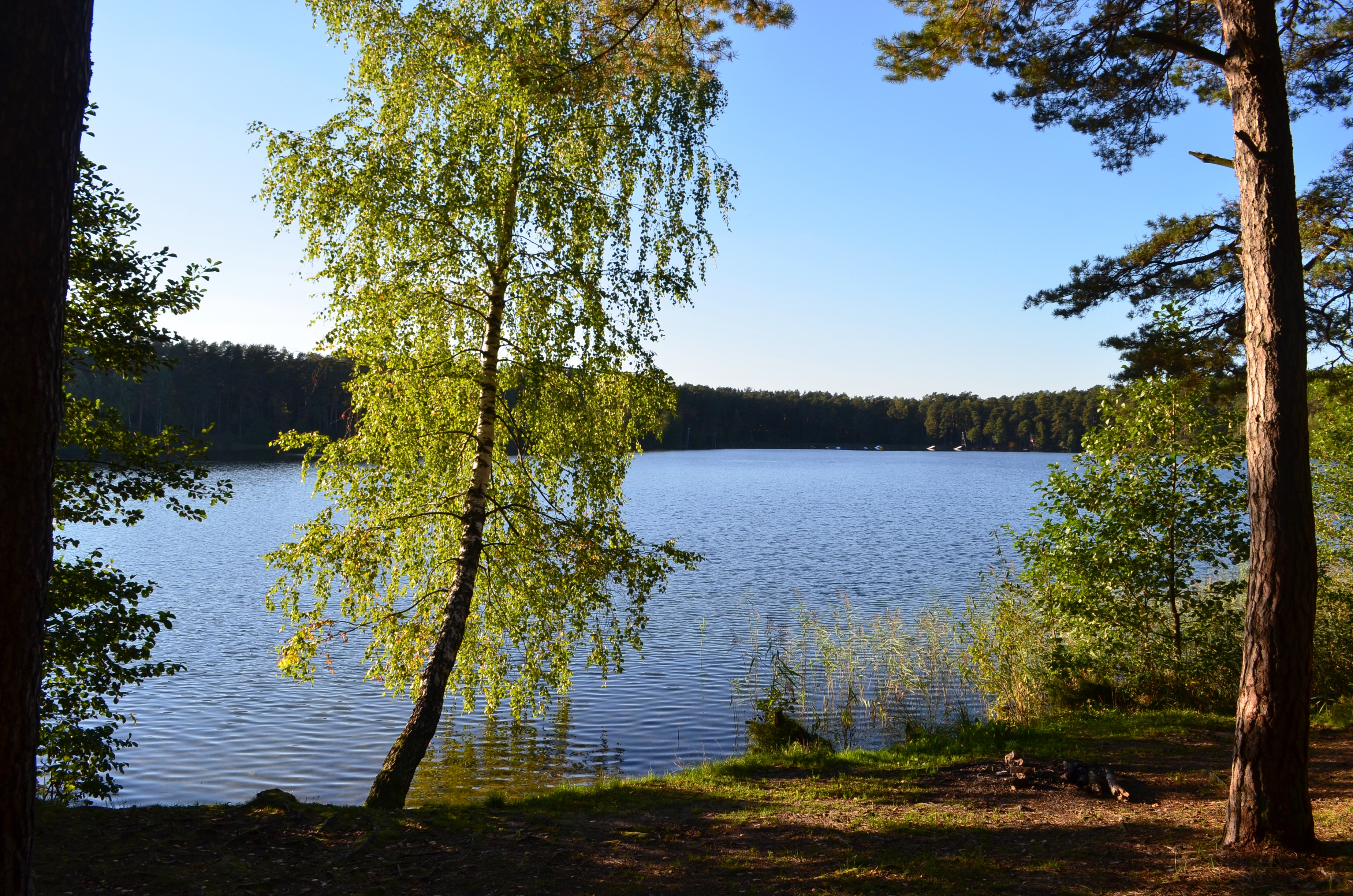 Balžis nuo rytinio kranto, Vilnius